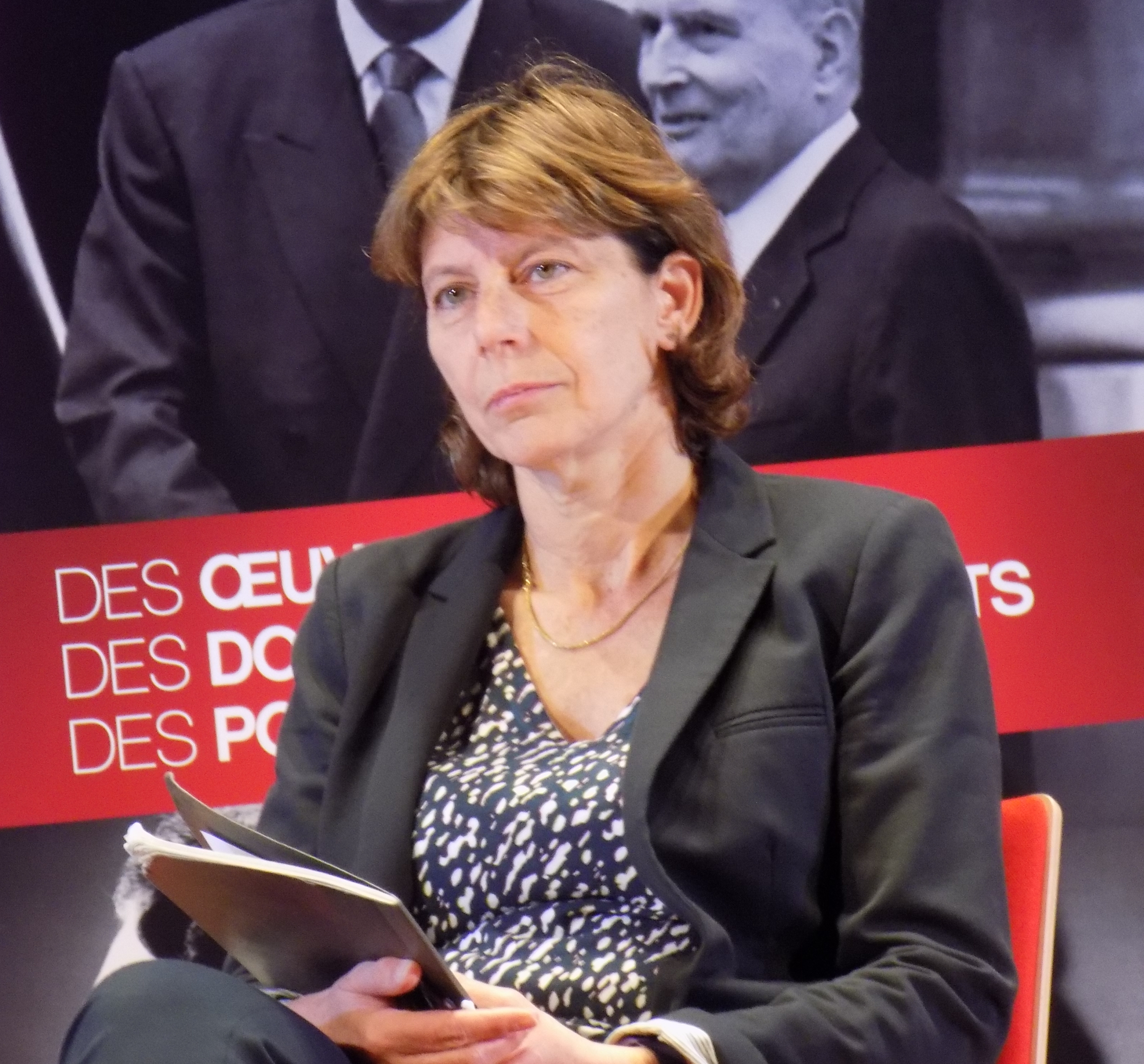 Perrine Simon-Nahum lors du forum « L’année vue par l’histoire » organisé par France Culture le 25 mars 2017